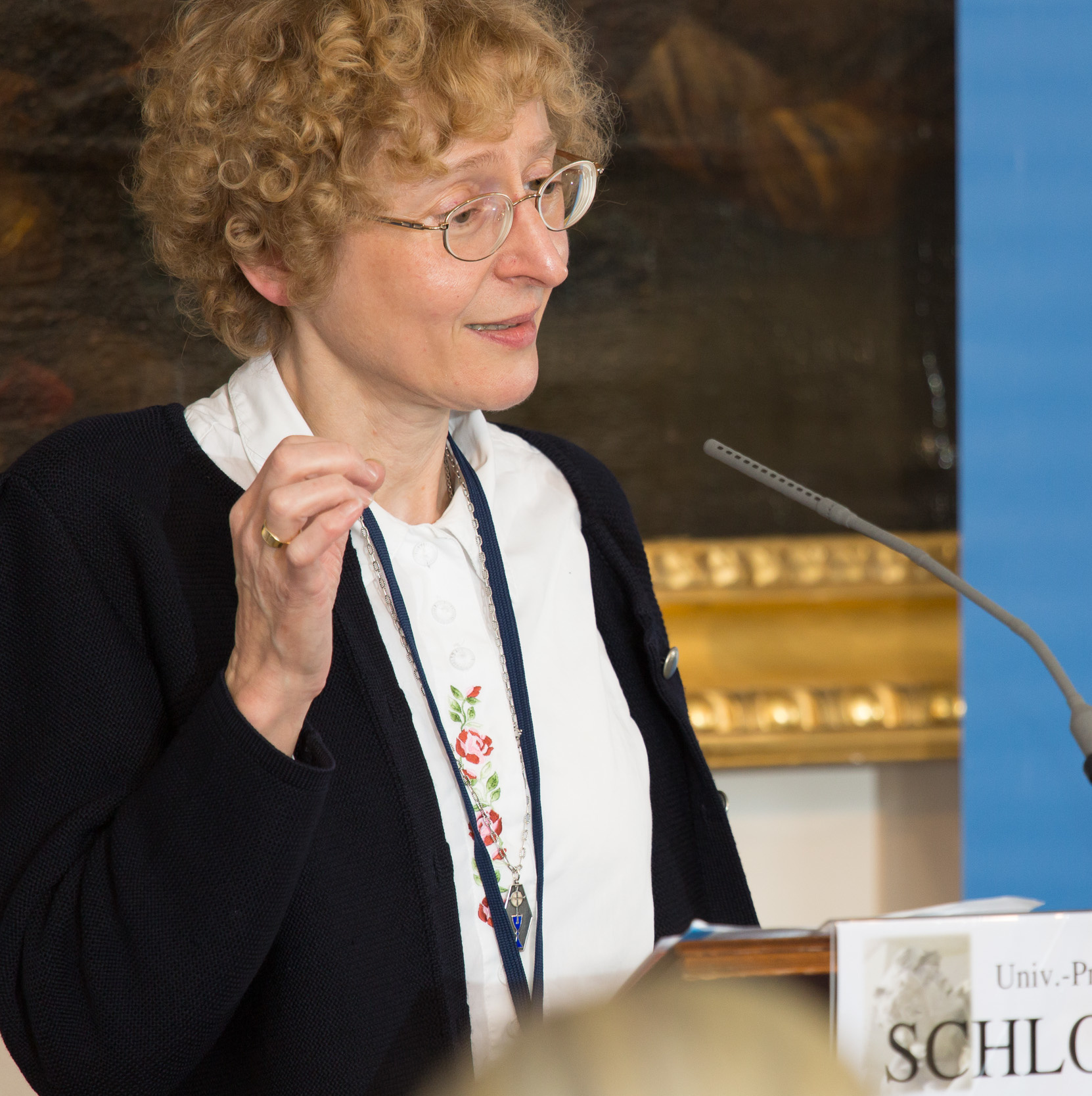 Marianne Schlosser auf der Fachtagung "Gottesfurcht & Heidenangst"